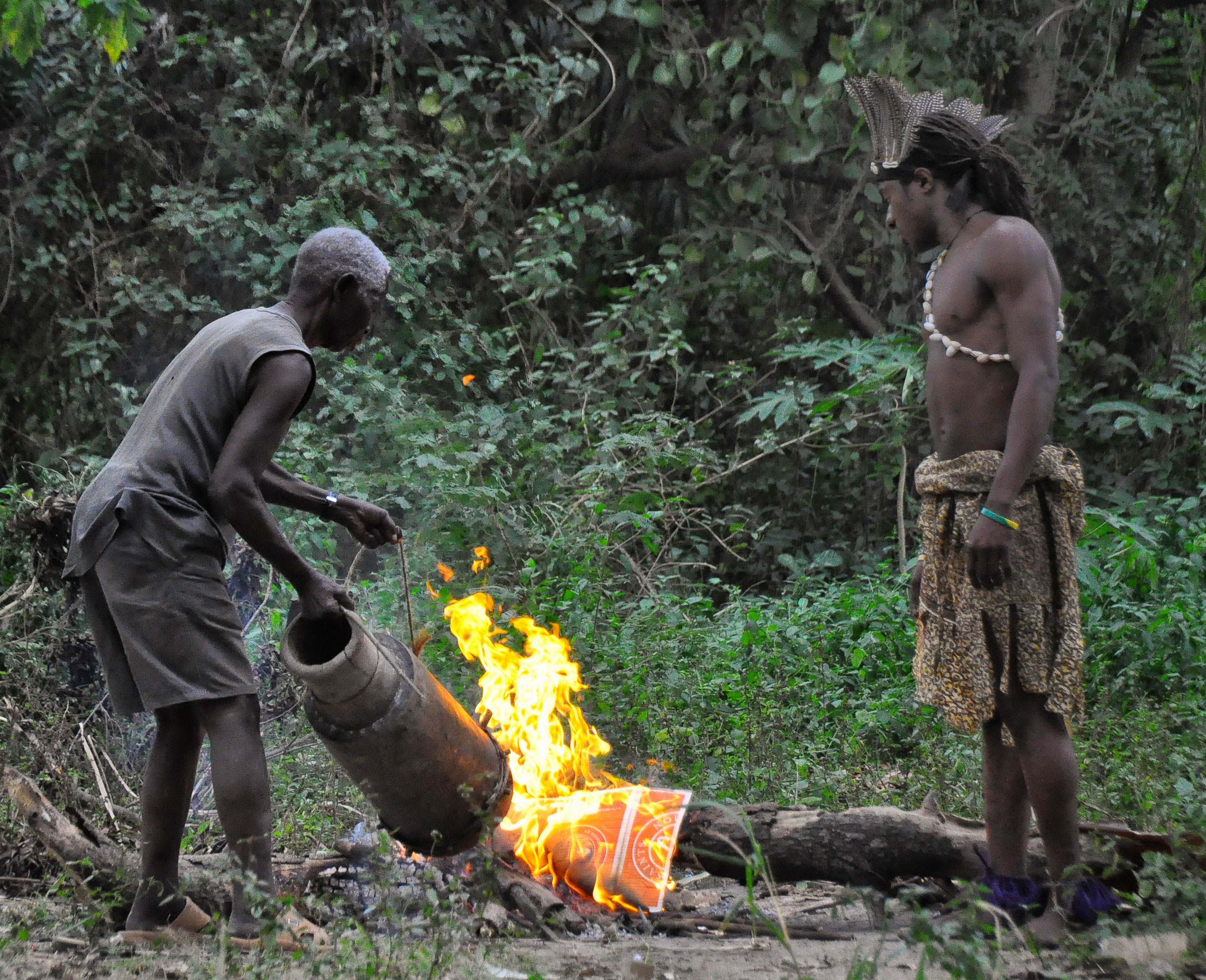 Drum Skin Tightening in Tanzania